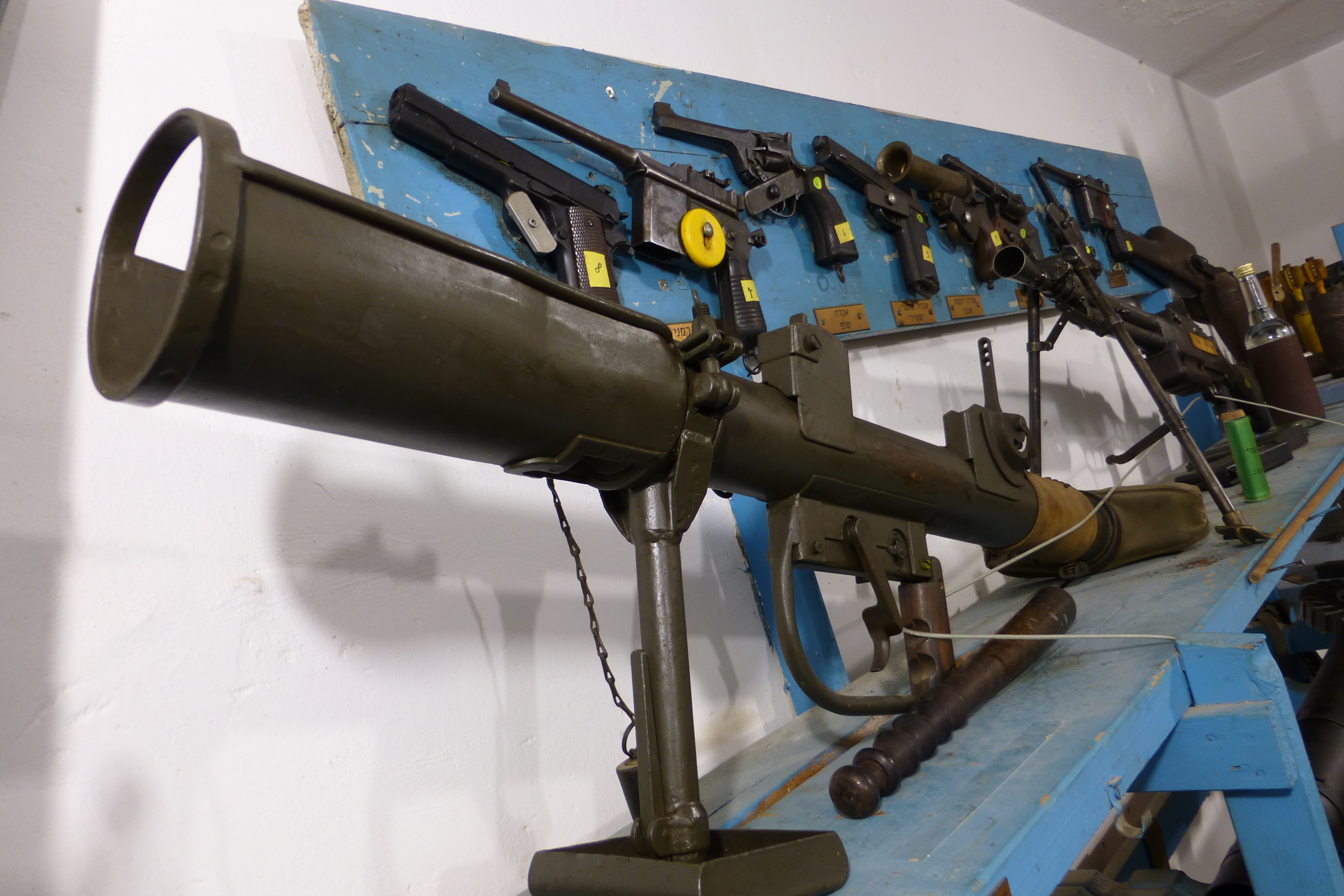 הסליק בקיבוץ יגור, סליק ארצי - נבנה בשנים 1937 - 1938. זה היה הסליק המרכזי בצפון הארץ. הסליק התפרסם כשנתגלה בעת חיפוש שנערך בקיבוץ בזמן השבת השחורה ב-29 ביוני 1946. הבריטים חפשו במשך מספר ימים בעזרת כלבים ומגלי מתכות ולבסוף גילו את הסליק המרכזי ועוד 25 סליקים קטנים. הנשק שהיה בסליקים הוחרם וחלק מחברי הקיבוץ נאסרו. זה היה אחד הסליקים הגדולים שבו נתפסו כ- 80 מרגמות 52 מ"מ, עשרות רובים תת-מקלעים ותחמושת רבה. הסליק המרכזי שנותר ריק לחלוטין מאז השבת השחורה, שוחזר ושופץ בשנת 1983 במסגרת חגיגות ה- 60 לקיבוץ.